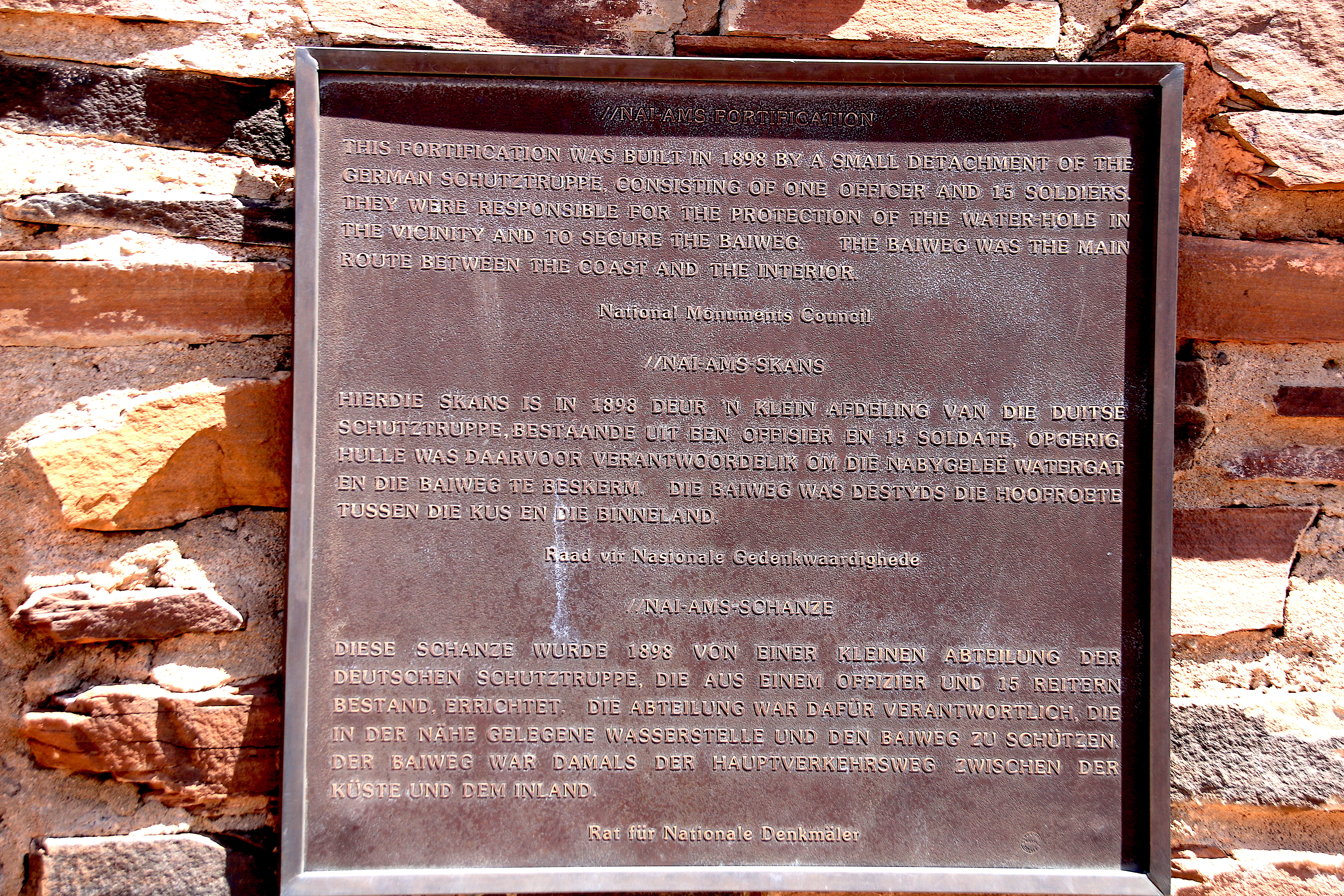 Tafel der Nai-Ams-Schanze (2019)